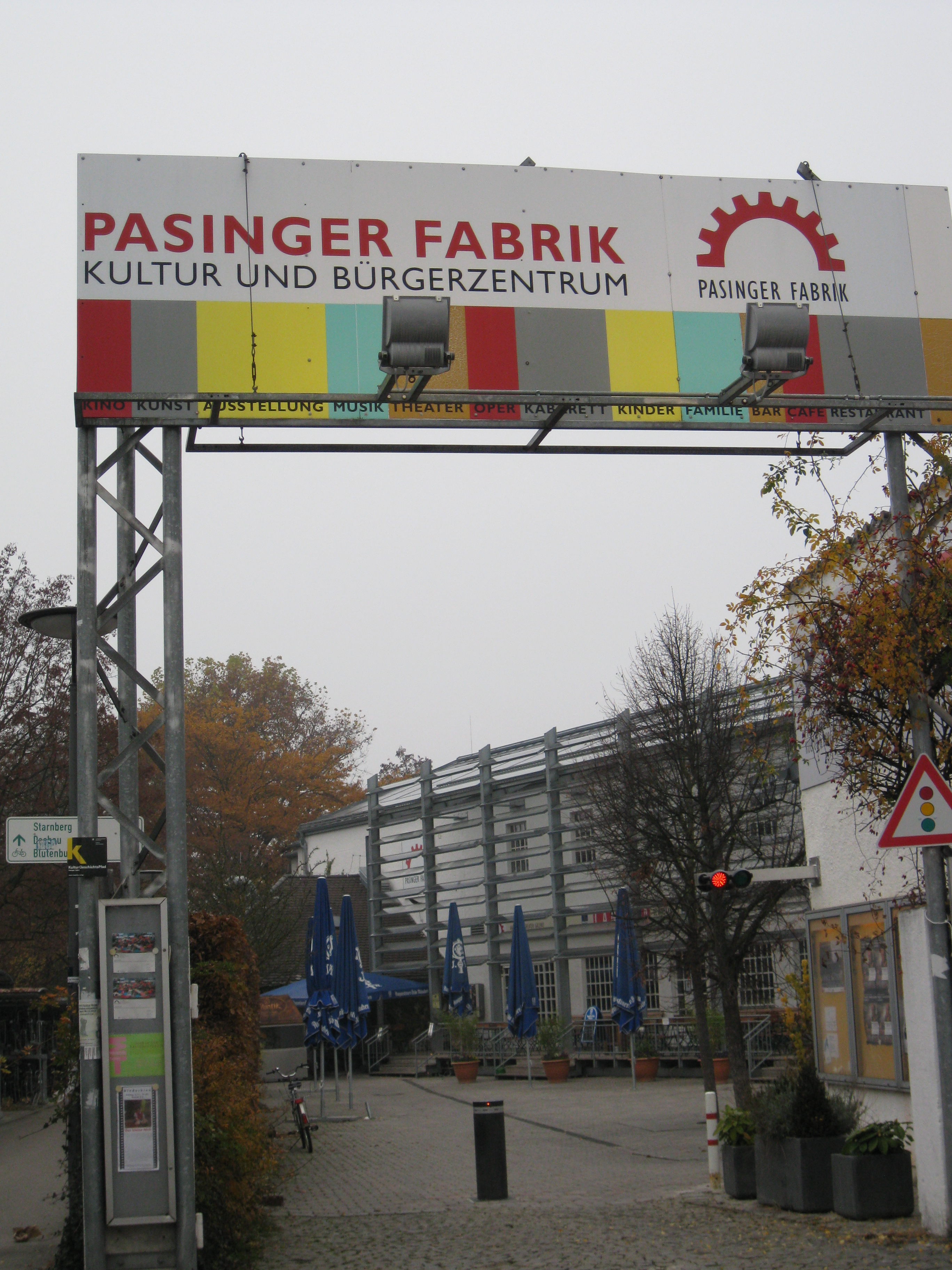 Pasinger Fabrik - Kulturzentrum in München-Pasing